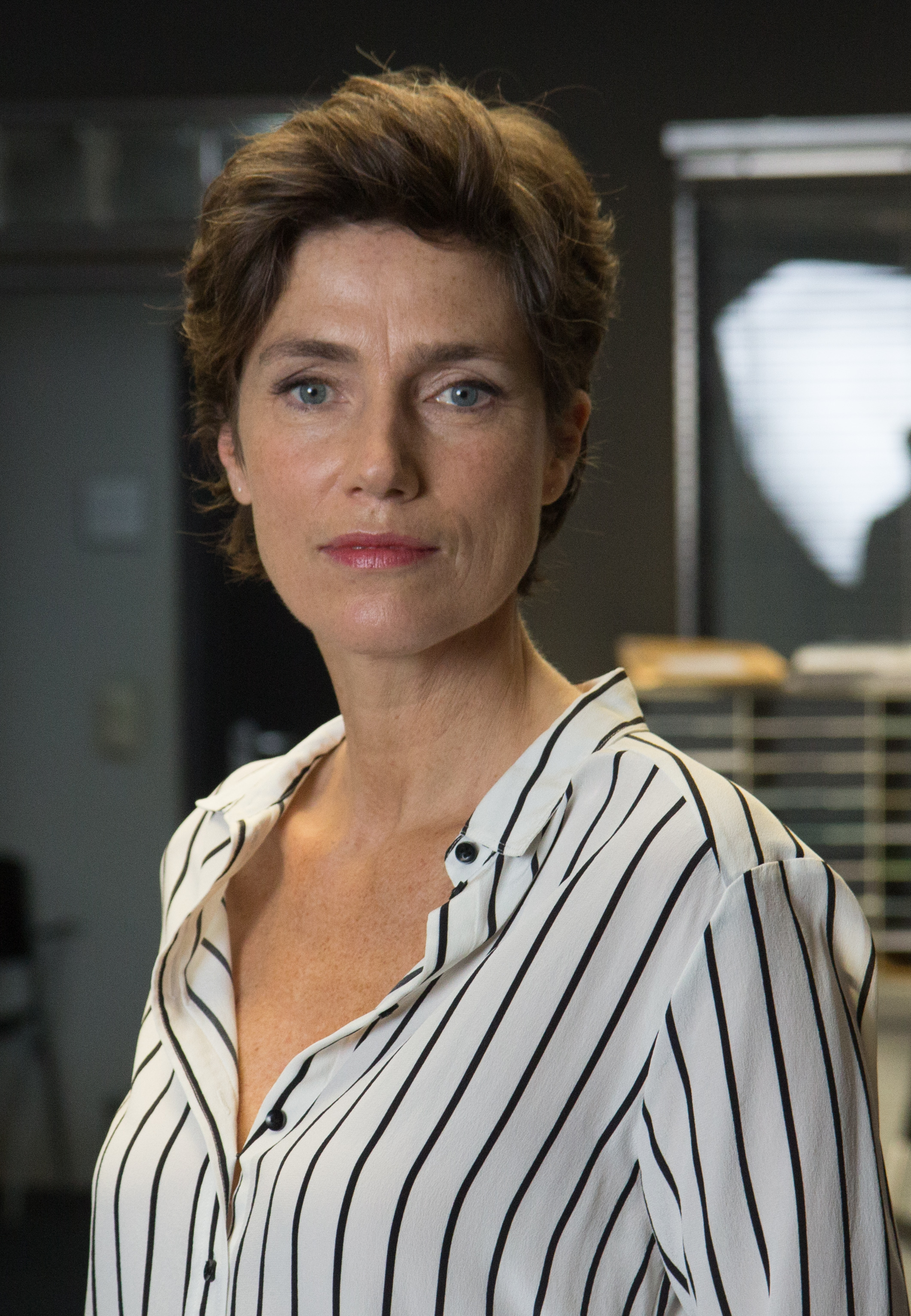 Pressetermin am Set der ZDF-Krimiserie "Professor T." mit den Hauptdarstellern Matthias Matschke, Andreas Helgi Schmid, Paul Faßnacht, Julia Bremermann und Axel Schneider